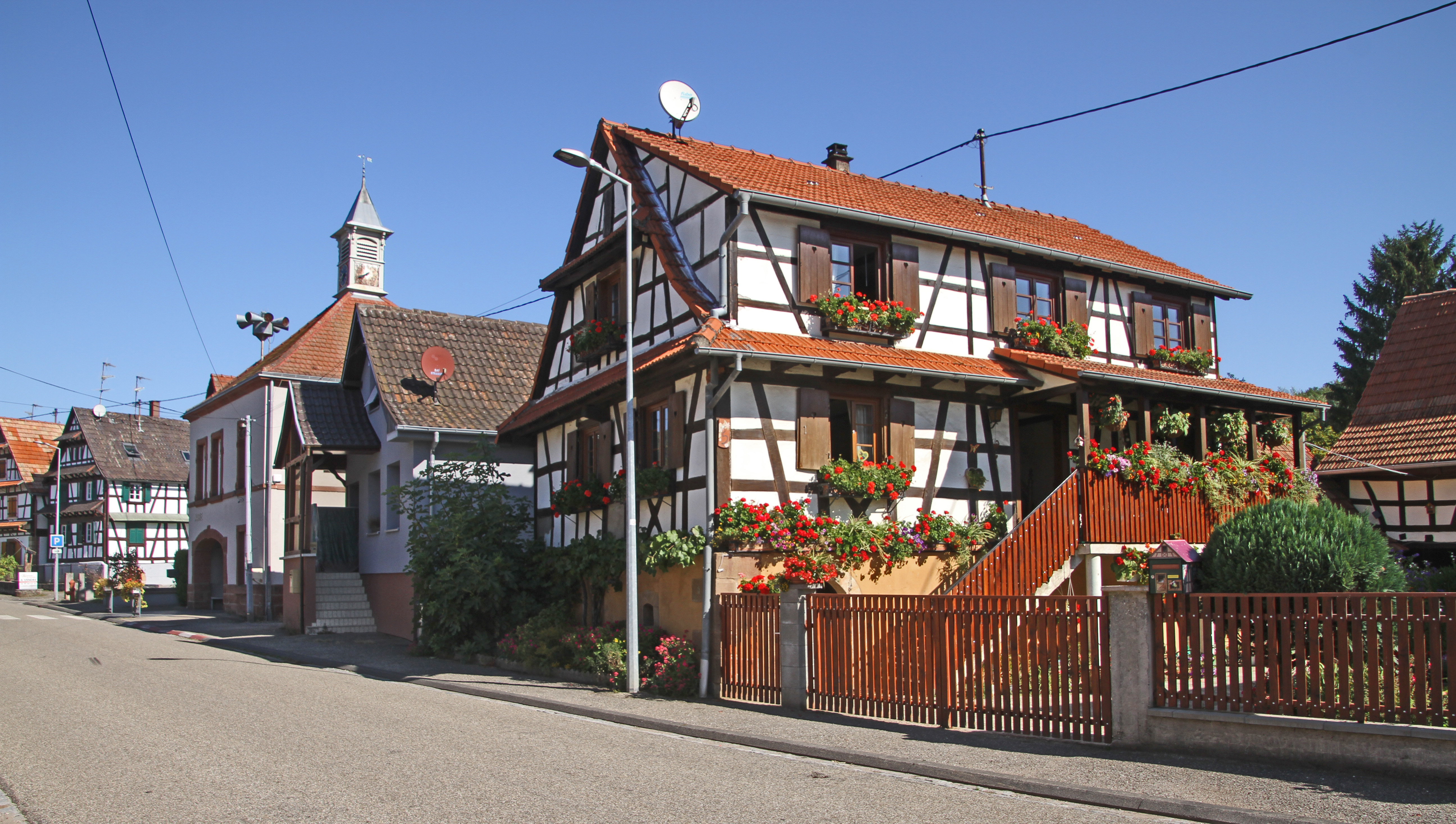 Lobsann